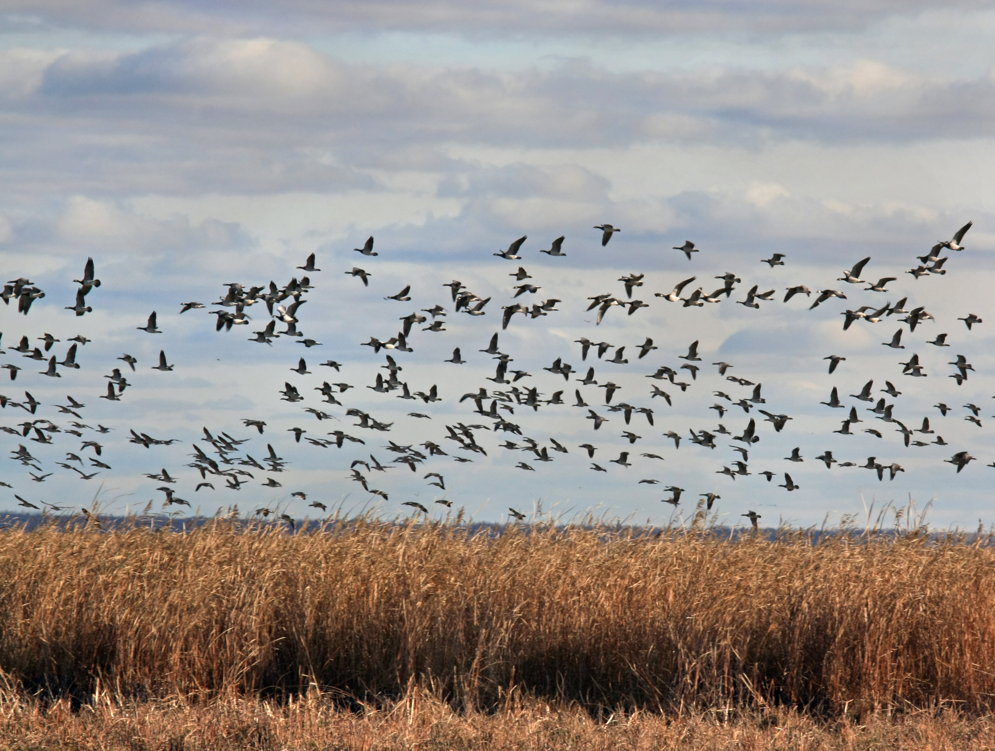 Matsalu looduskaitse ala.Vaade Haeska vaatetornist 500m Lääne suunas